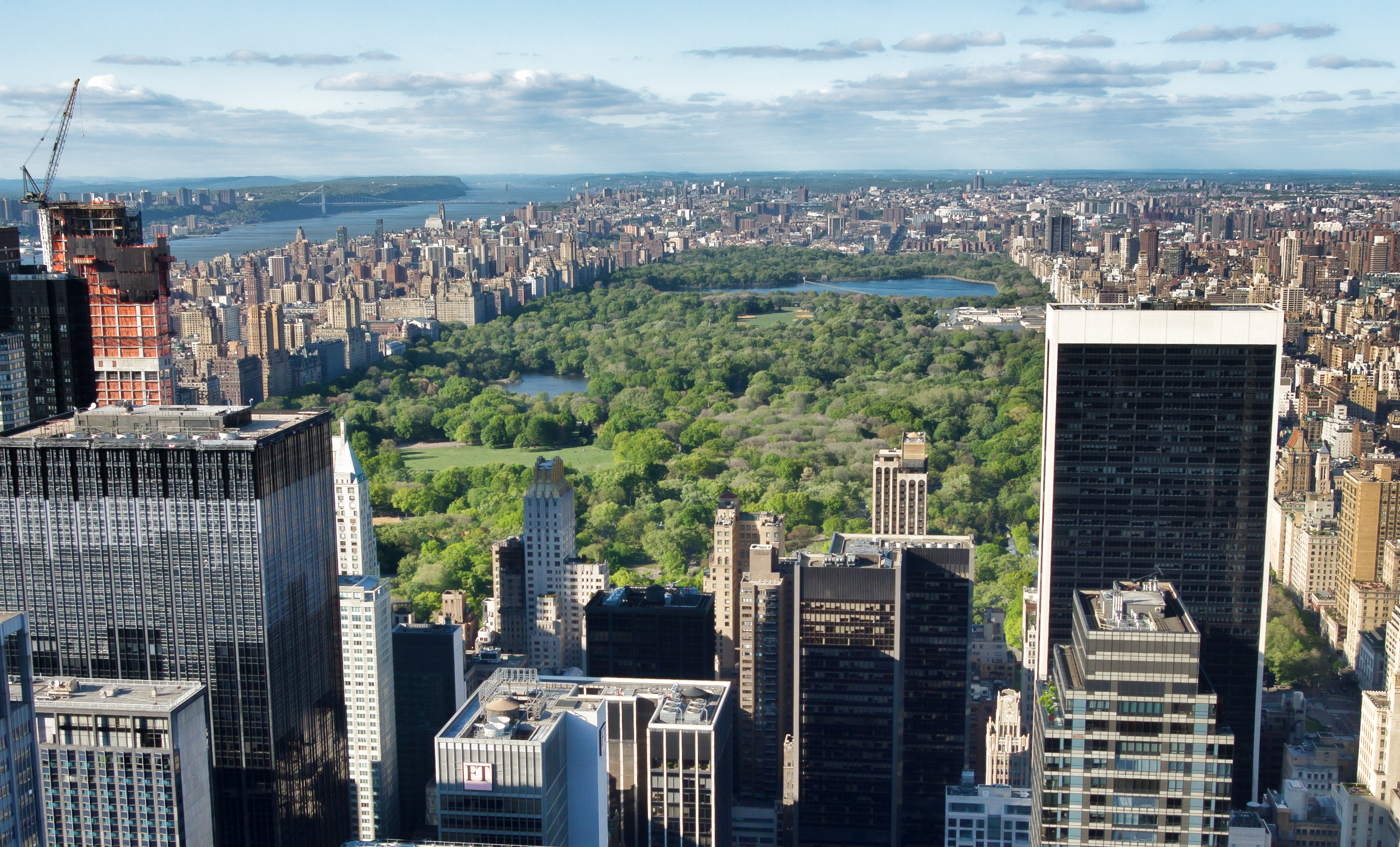 NYC - Manhattan - Central-Park